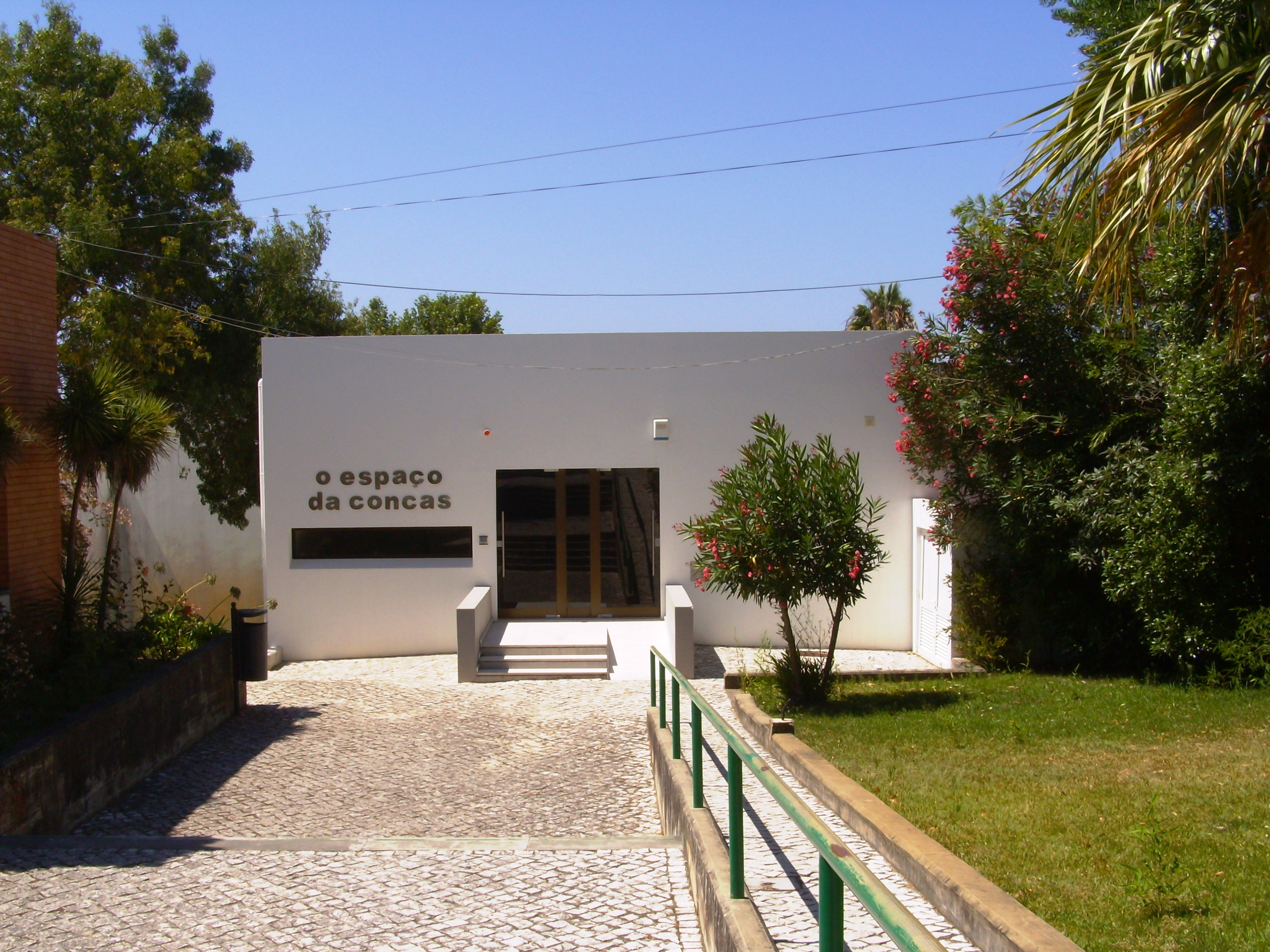 "O Espaço da Concas", Centro de Artes, Caldas da Rainha, Distrito de Leiria, Portugal.